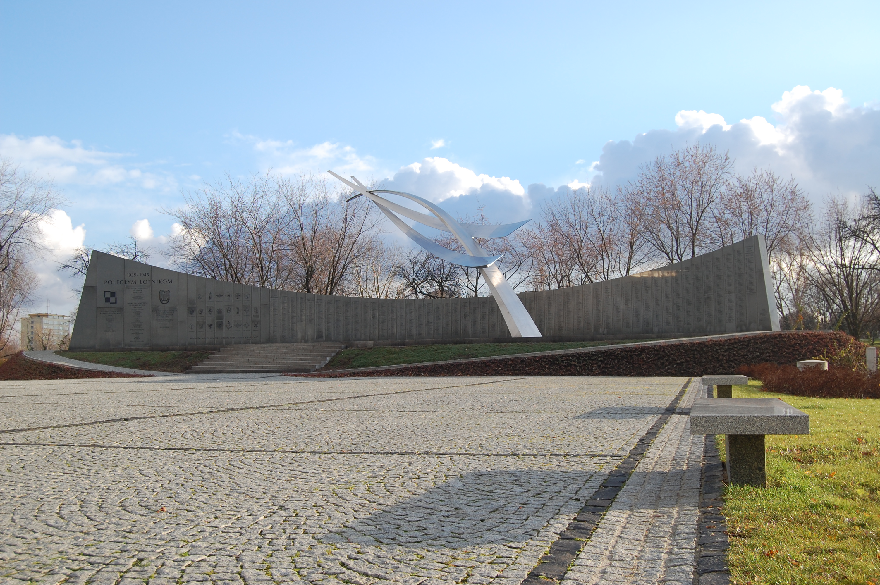 Pomnik Lotników w Warszawie].